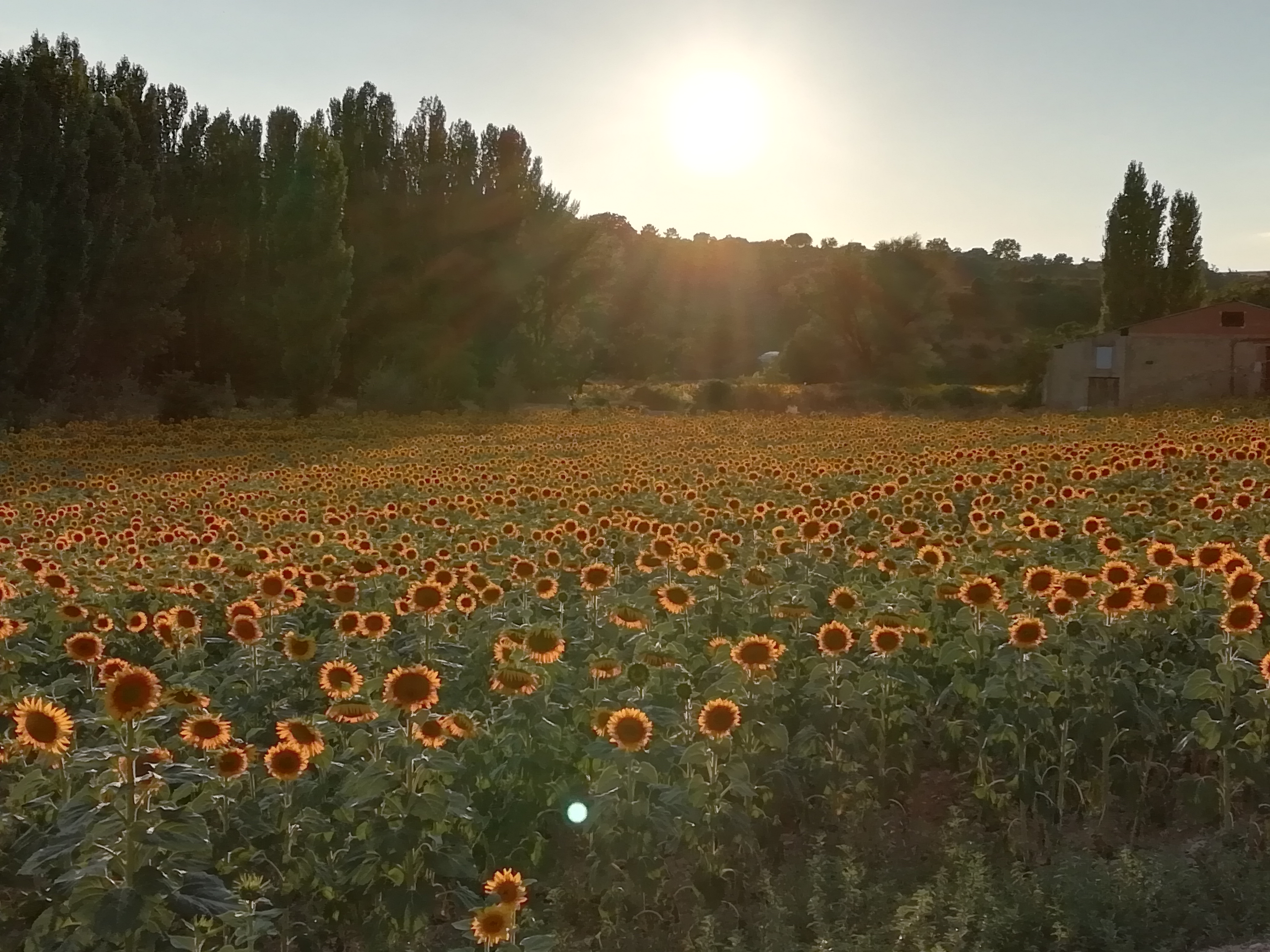 La humedad del río San Juan es suficiente para hacer crecer este florido y pequeño rodal de girasoles, en la vega de dicho río.